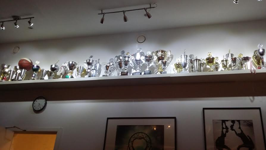 Stevnsgades pokaler i klublokalet